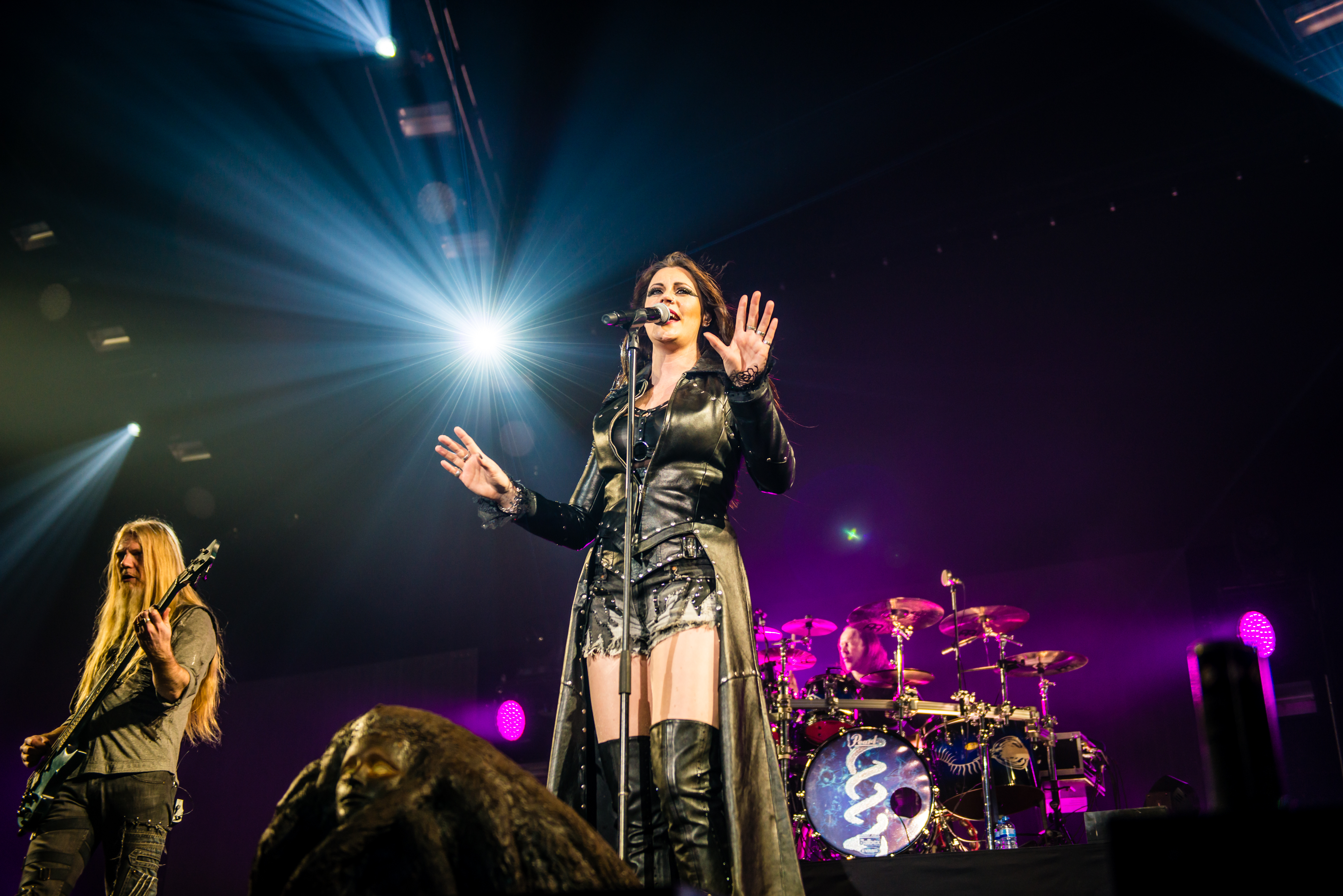 'Nightwish Endless forms most beautiful Tour 2015 Oberhausen'